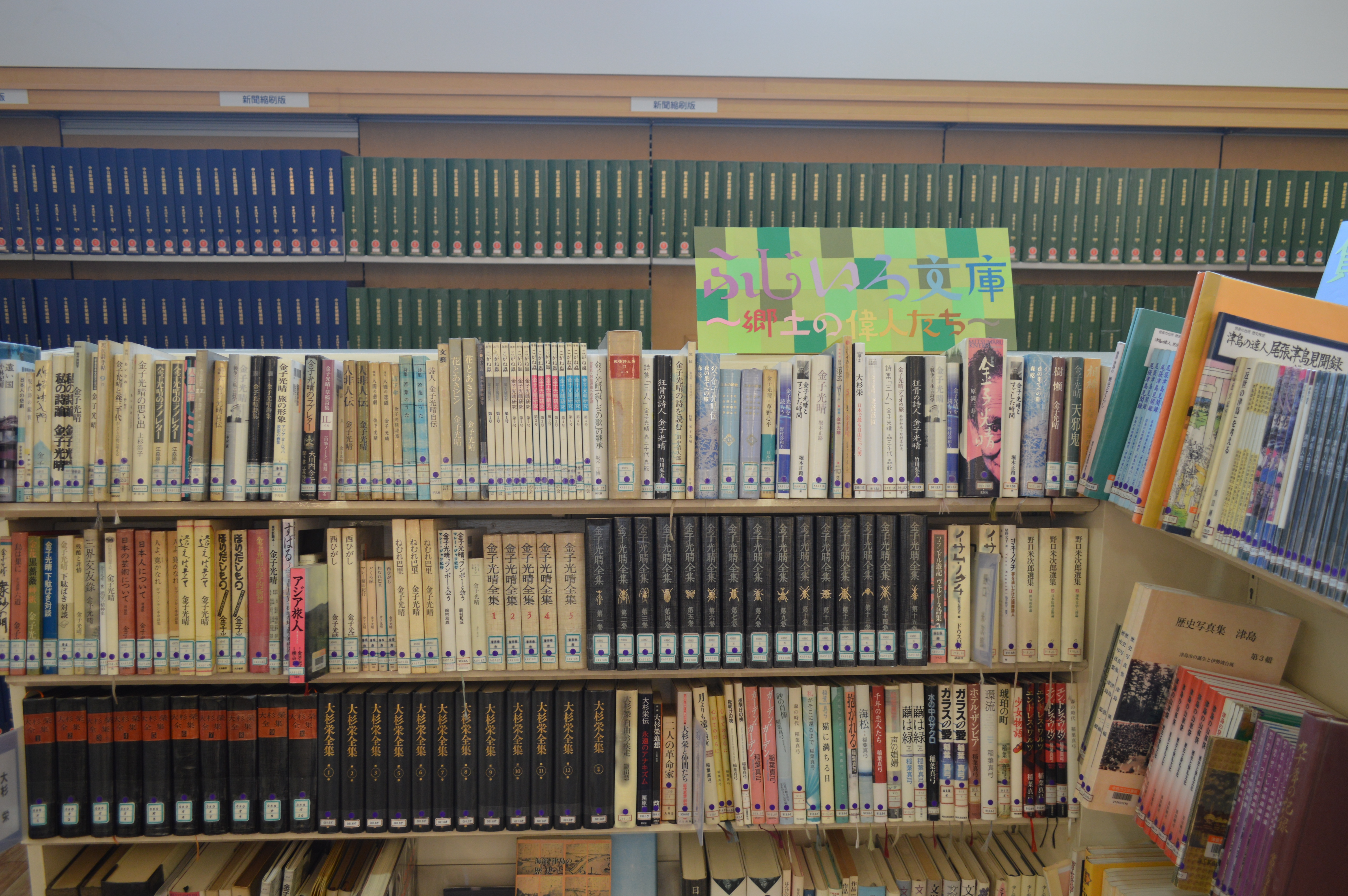 津島市立図書館1階。新聞縮刷版（奥）と「ふじいろ文庫」（郷土の偉人）。